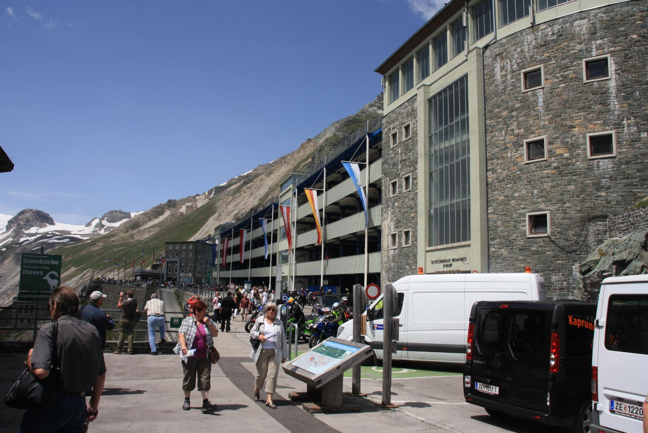 Das Besucherrzentrum an der Kaiser-Franz-Josefs-Höhe an der Großglockner-Hochalpenstraße mit dem Geschossparkplatz Freiwandeck